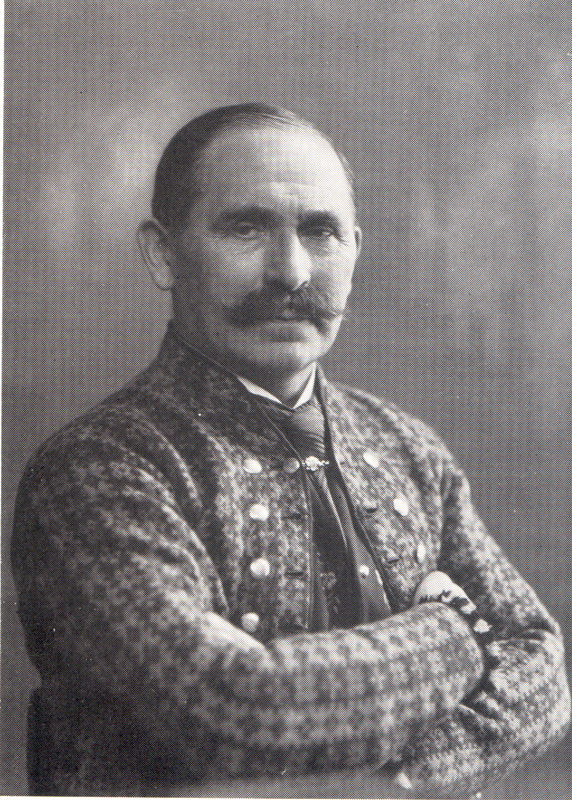 Føroyskt: Jóannes Patursson (1866–1946), kongsbóndi.